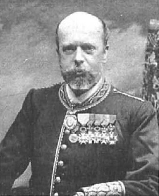 Retrato de Guillermo de Osma por Kaulak y recogido en la revista española Nuevo Mundo.